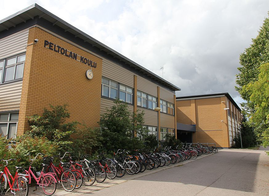 Peltolan koulu on Vantaan Tikkurilan urheilupuistossa sijaitseva, peruskoulun 7.-9. luokkien opetukseen keskittyvä koulu. Huom: Muista säilyttää viittaus kuvaajaan, mikäli käytät kuvaa.